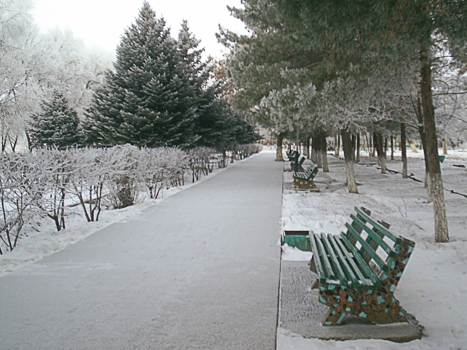 Мемориальный комплекс «Крыло Икара», город Ахтубинск